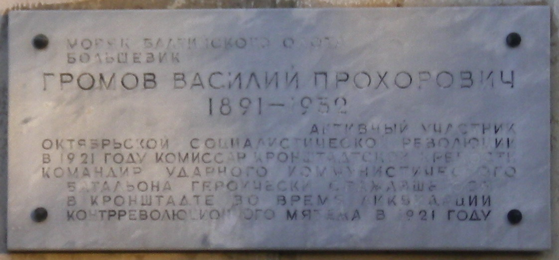 Мемориальная табличка на улице Громова